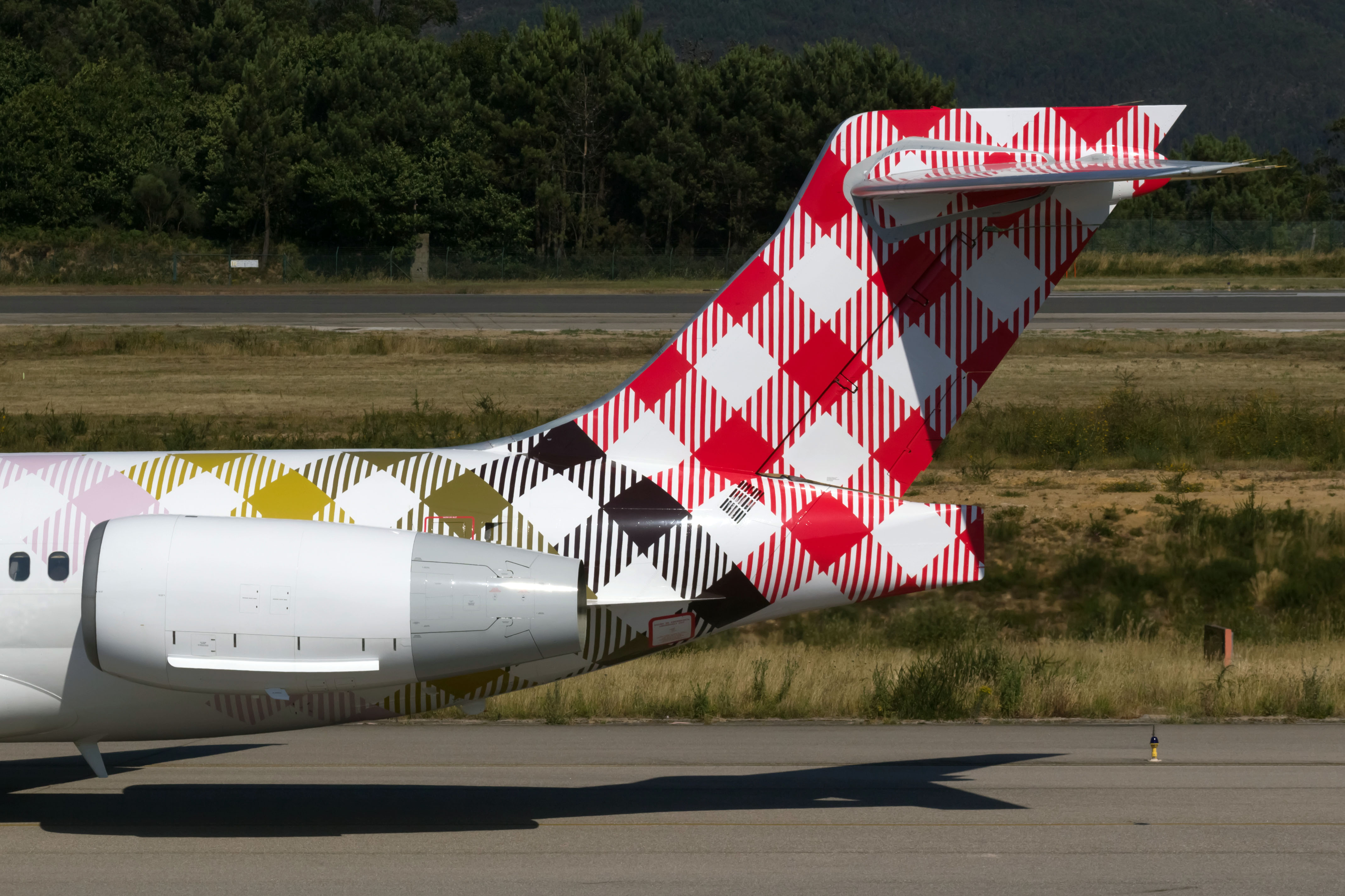 Deriva dun Boeing 717 de Volotea no aeroporto de Vigo.